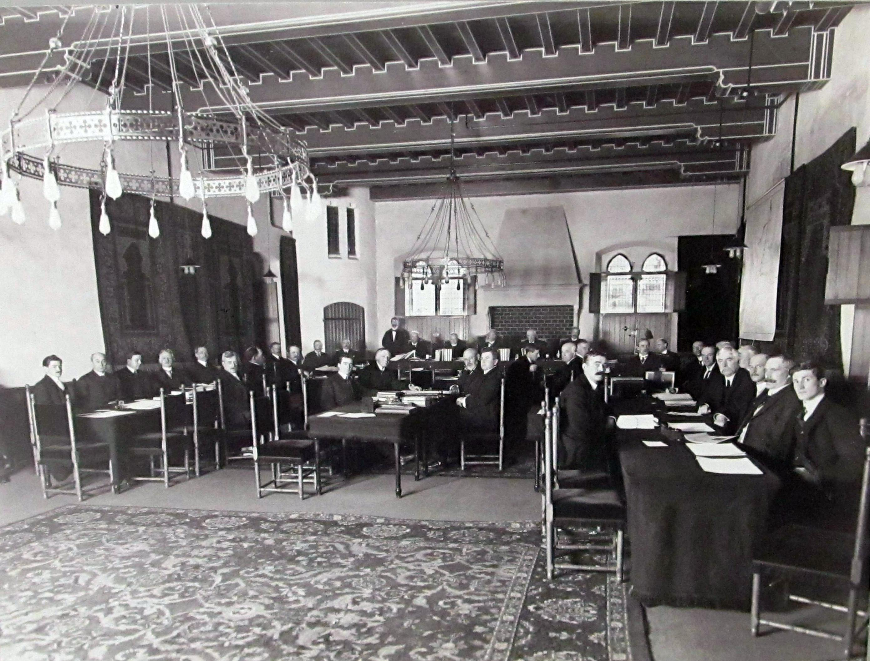 North Atlantic Fisheries Arbitration at the Permanent Court of Arbitration, The Hague, 1910.